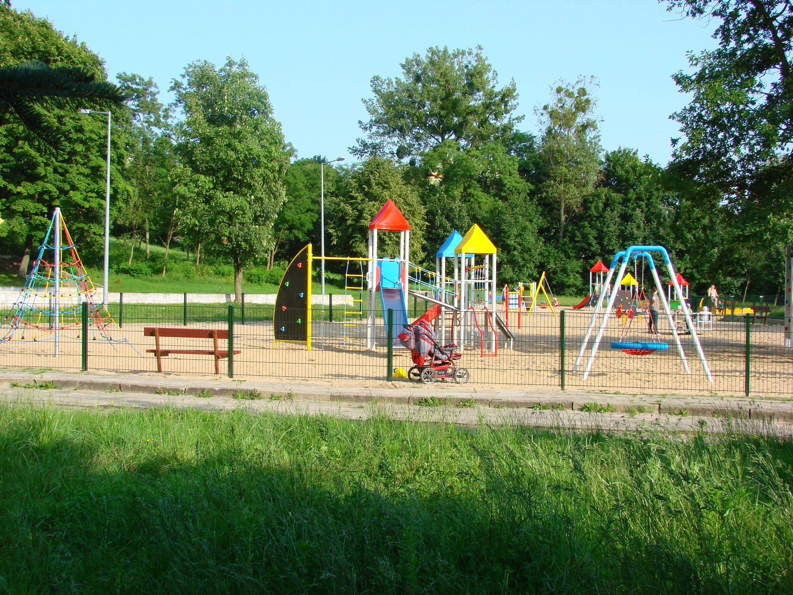 Plac Zabaw na Pl. Przyjaźni; przy Parku zieleni, na Starym Mieście. Place in Sępólno Krajeńskie, Poland.